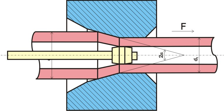 wire drawing